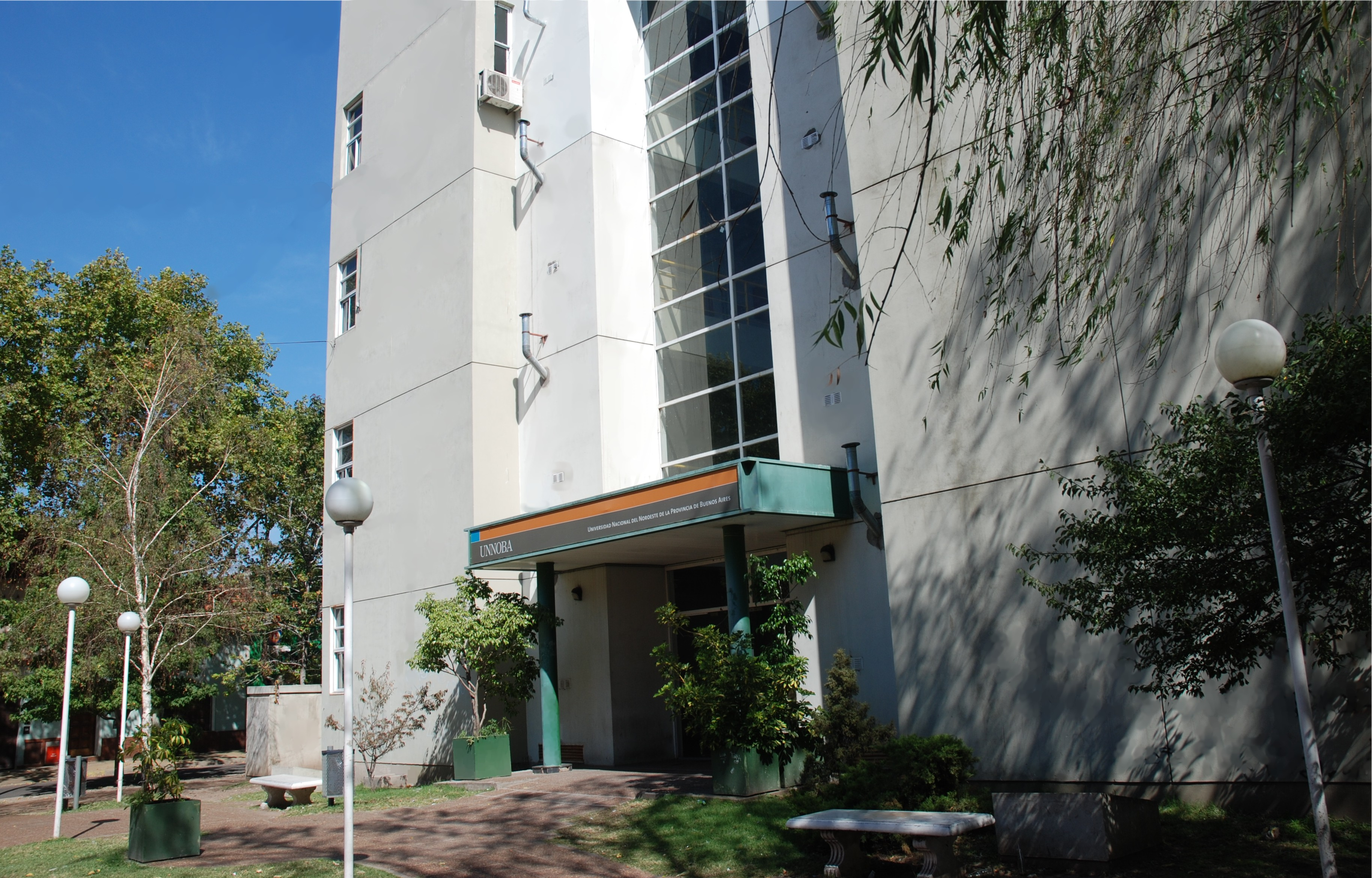 Sede "Rivadavia" de la Universidad Nacional del Noroeste de la Provincia de Buenos Aires (UNNOBA), en Junín, Argentina. Posee laboratorio y aulas.